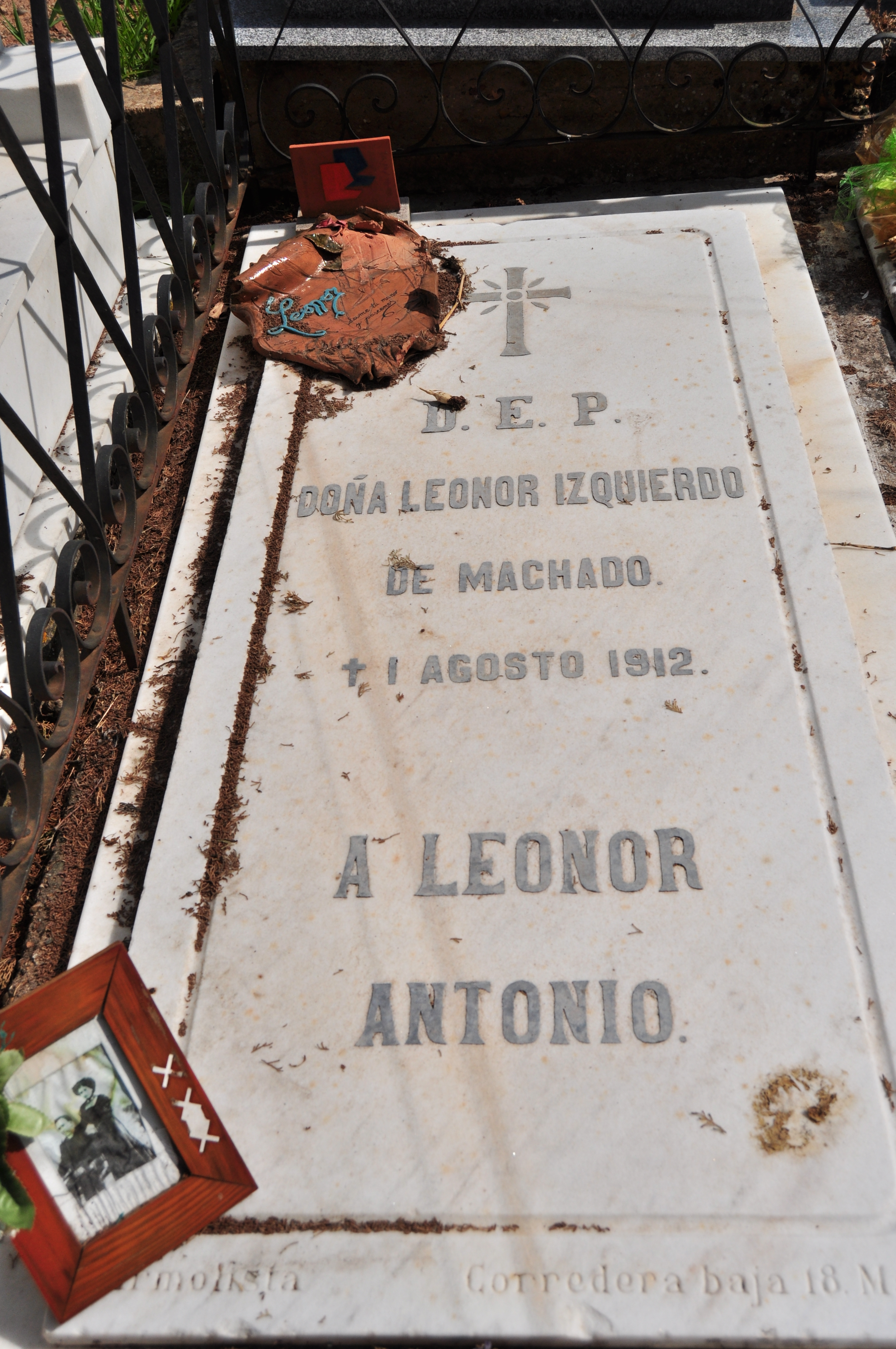 Soria Capital - 191